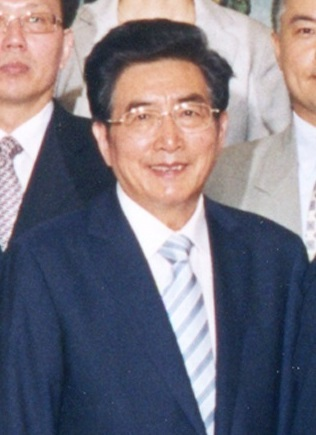 郭金龙，曾任中共中央政治局委员、北京市委书记、北京市市长、安徽省委书记、西藏自治区党委书记。